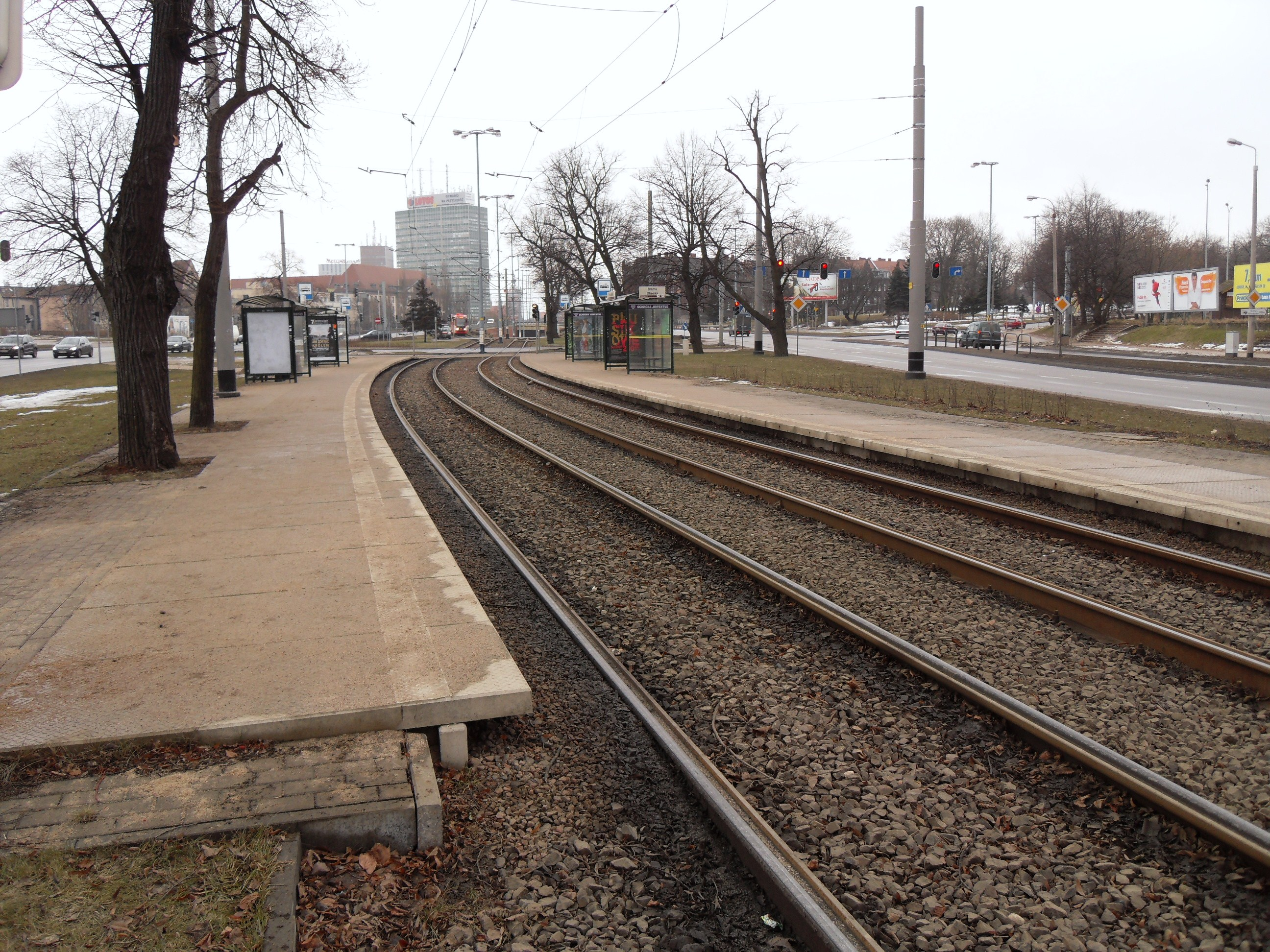 Gdańsk Aniołki. Przystanek tramwajowy Brama Oliwska.